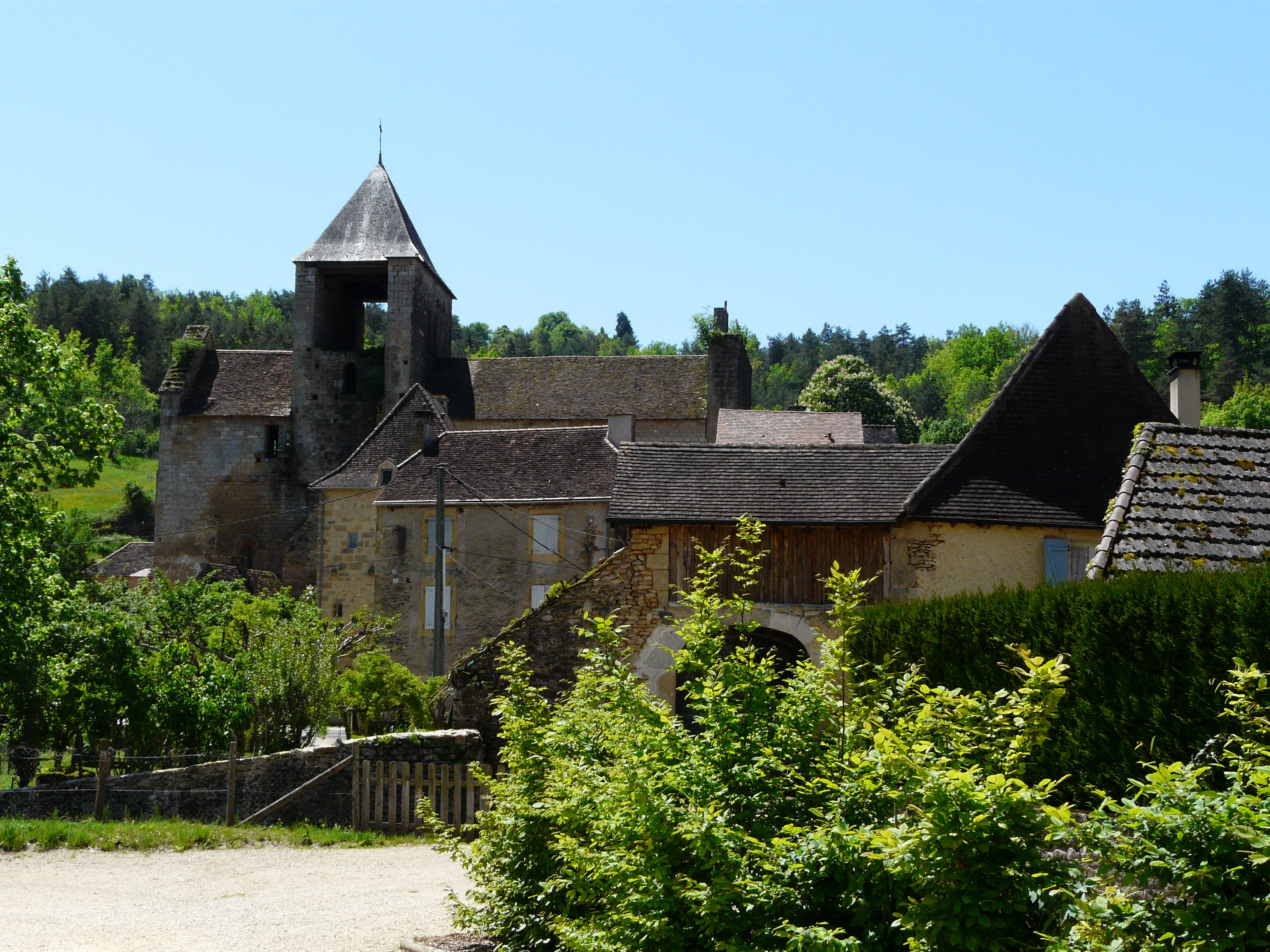 le village d'Auriac-du-Périgord et son église, Dordogne, France.